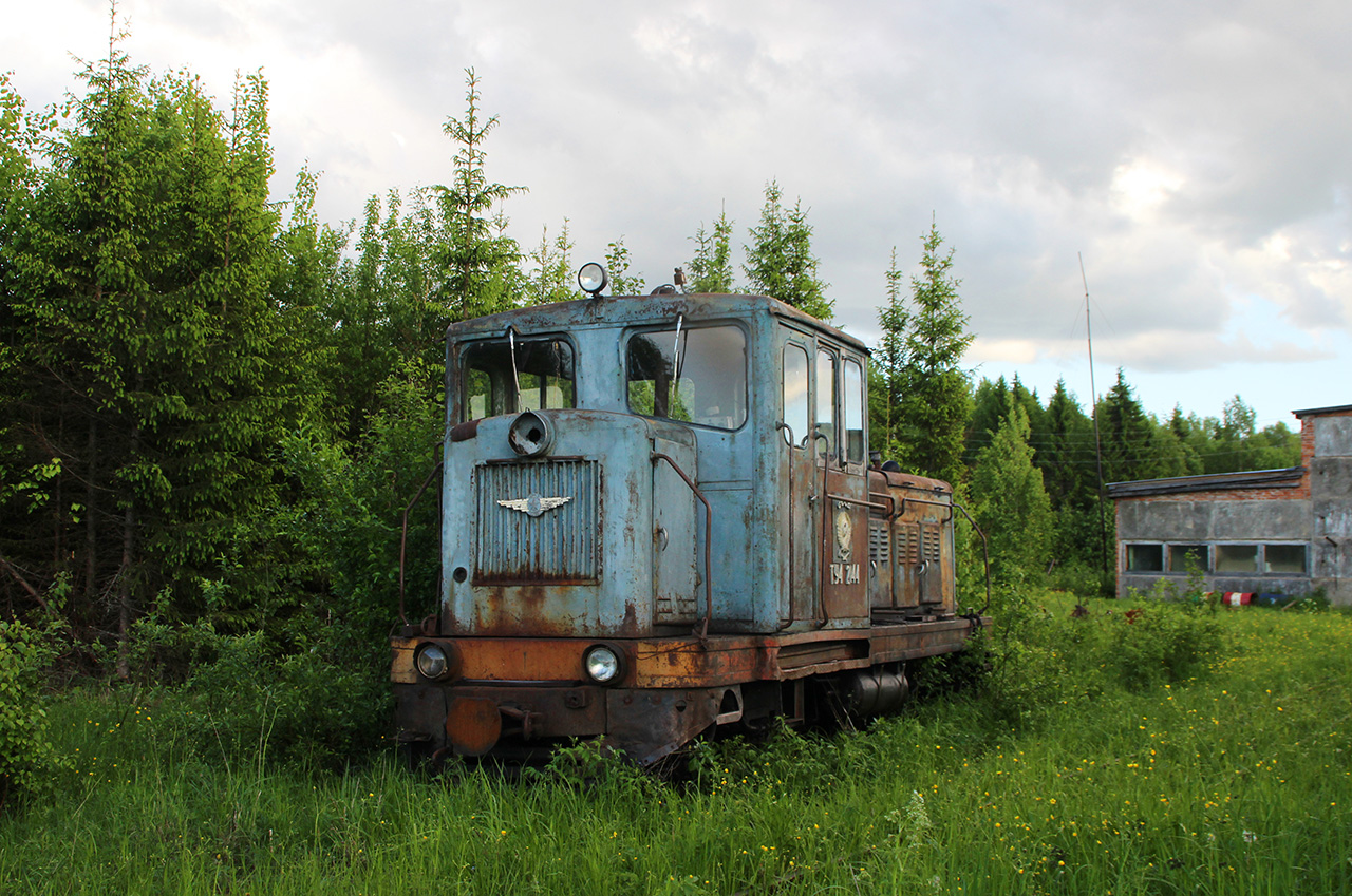 Тепловоз ТУ4-2144, Лунданская УЖД